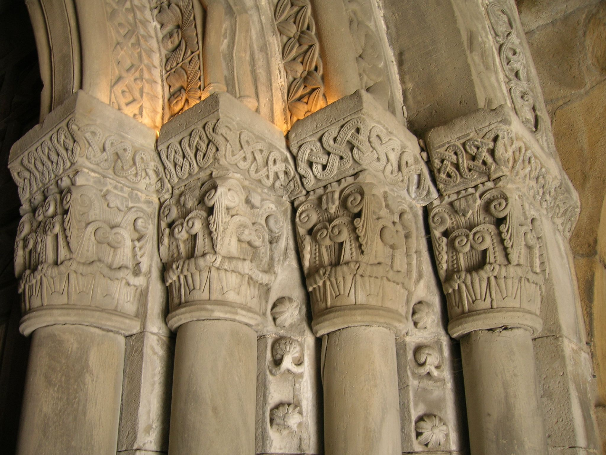 Capiteles en la portada meridional.